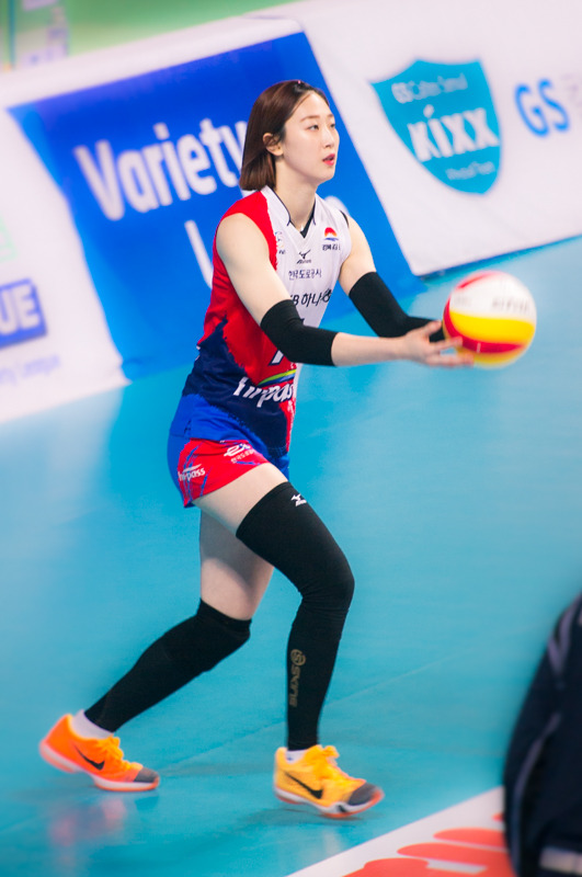 미녀 여자배구선수 고예림